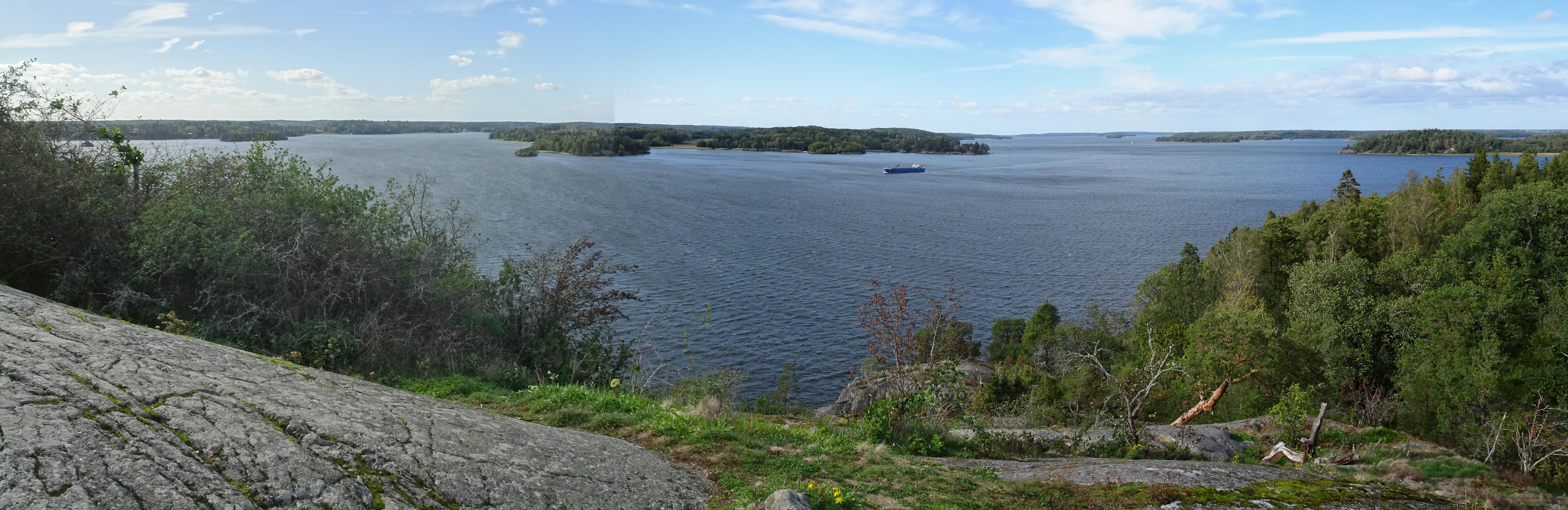 Utsikt från Gåseborg mot väster